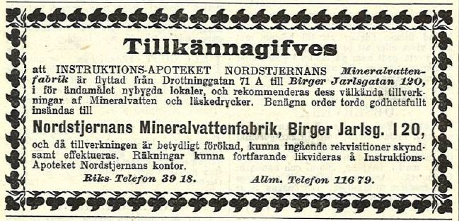 Nordstjernans Mineralvattenfabrik, annons i Idun 1899-08-23